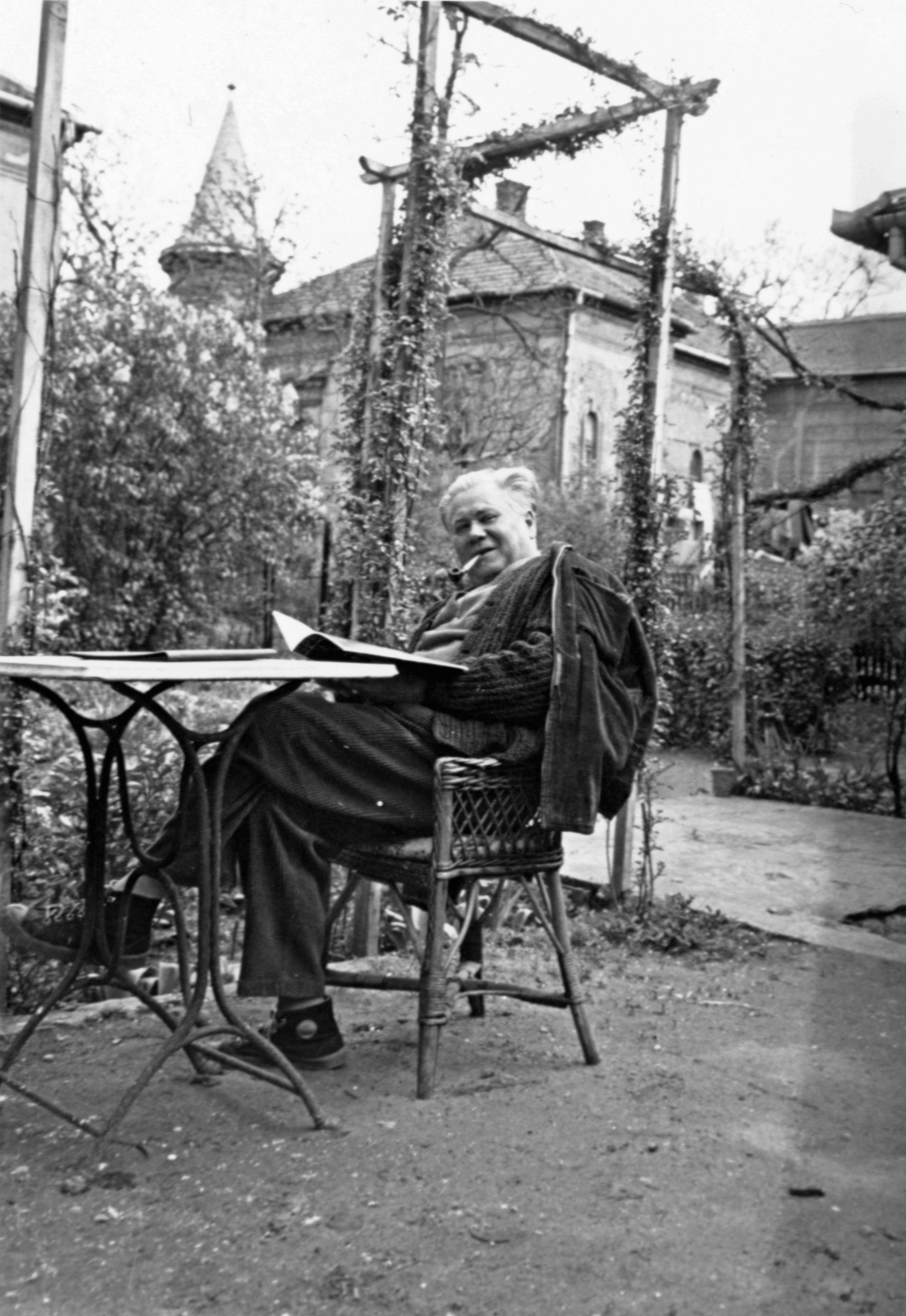 Batthyány utca 47/b, Kocsis András szobrászművész a háza kertjében. Location: Hungary, Budapest XV. Tags: Budapest Title: Batthyány utca 47/b, Kocsis András szobrászművész a háza kertjében.